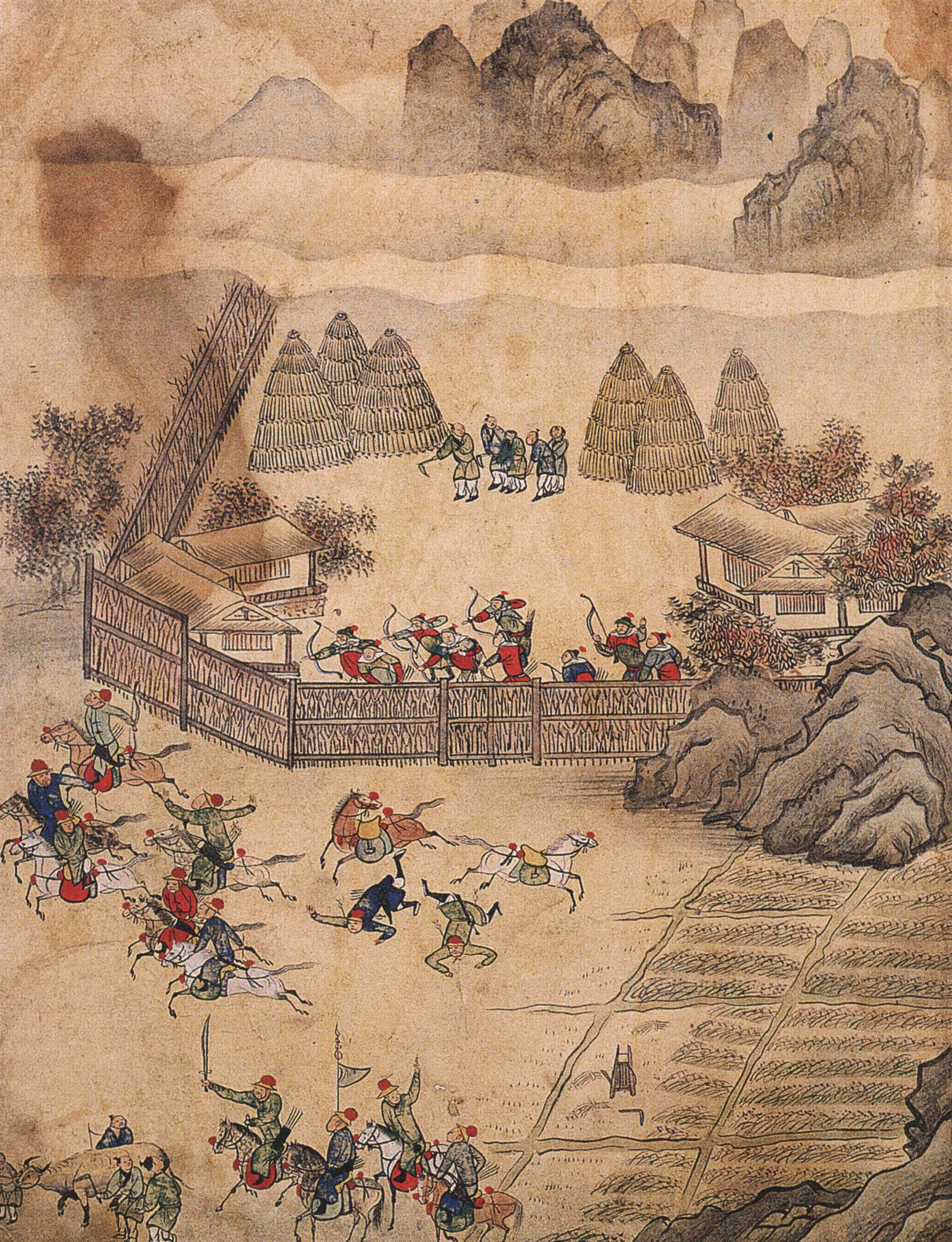 북관유적도첩(北關遺蹟圖帖)-수책거적도(守柵拒敵圖)